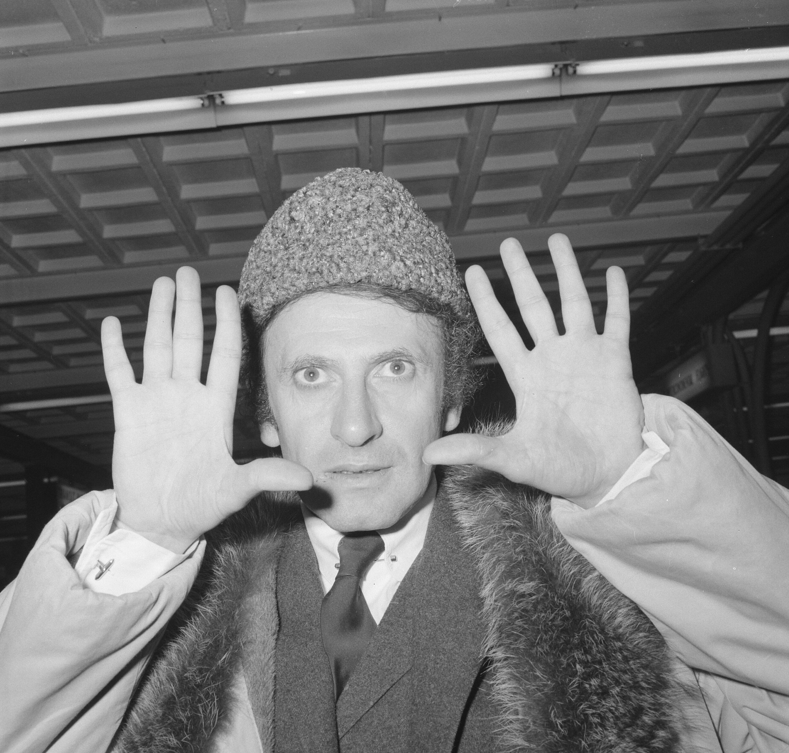 Collectie / Archief : Fotocollectie Anefo Reportage / Serie : [ onbekend ] Beschrijving : Marcel Marceau (mimespeler) op Schiphol, een der expressies van Marcel Datum : 15 december 1964 Locatie : Noord-Holland, Schiphol Trefwoorden : mimespelers Persoonsnaam : Marceau, Marcel Fotograaf : Nijs, Jac. de / Anefo Auteursrechthebbende : Nationaal Archief Materiaalsoort : Negatief (zwart/wit) Nummer archiefinventaris : bekijk toegang 2.24.01.03 Bestanddeelnummer : 917-2454